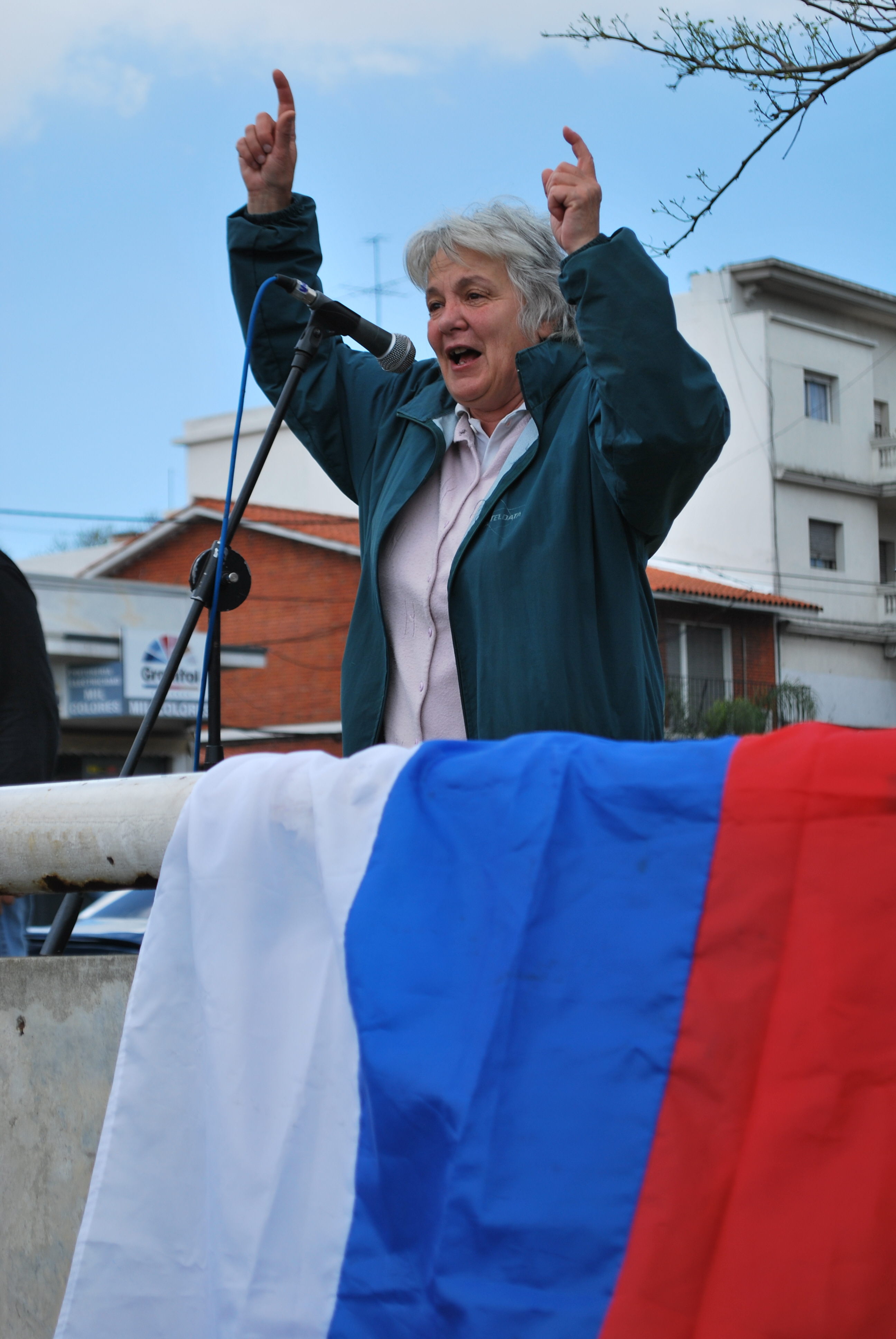 Fotografía de la política del Frente Amplio, Lucía Topolansky, en un acto de campaña de cara a las elecciones de octubre de 2009 en Uruguay.